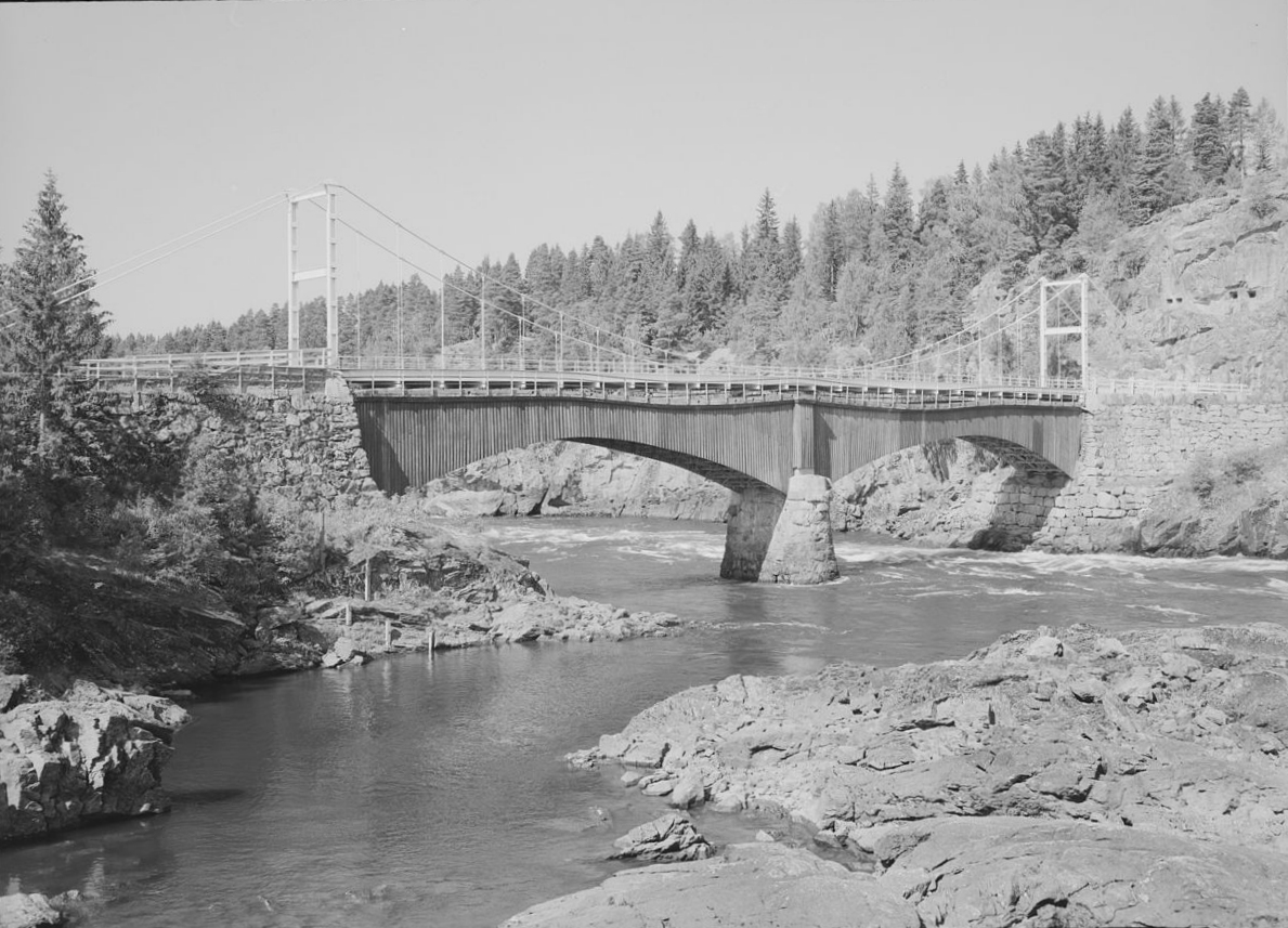 Bildet er hentet fra Nasjonalbibliotekets bildesamling Fossum,Glomma, Askim,Spydeberg, Østfold